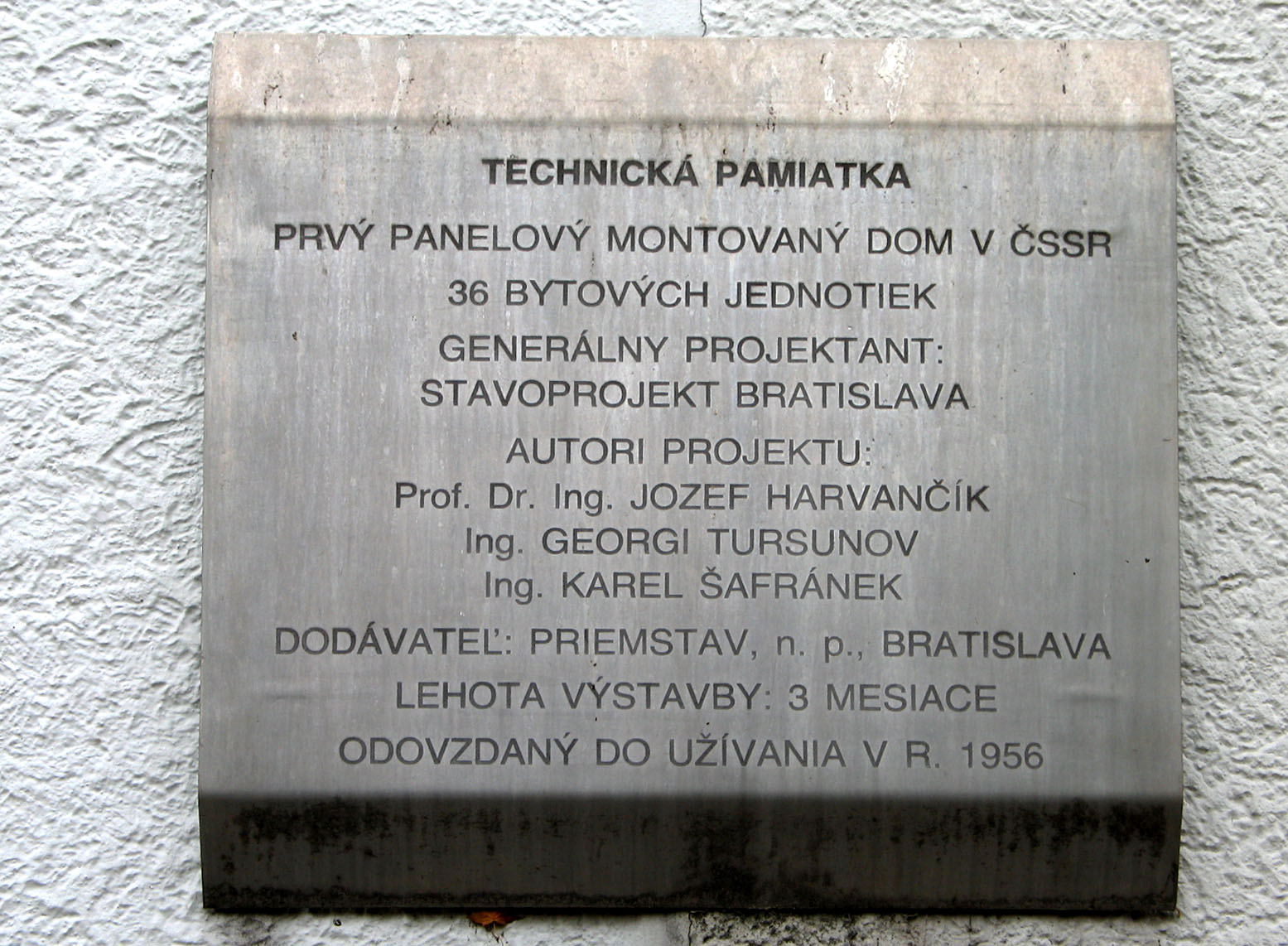 Pamätná tabuľa na prvom panelovom dome postavenom v ČSSR v roku 1958, ktorého projektantom okrem iného bol aj profesor Jozef Harvančík